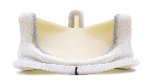 Биоклапан Карпентье-Эдвардс из бычьего перикарда